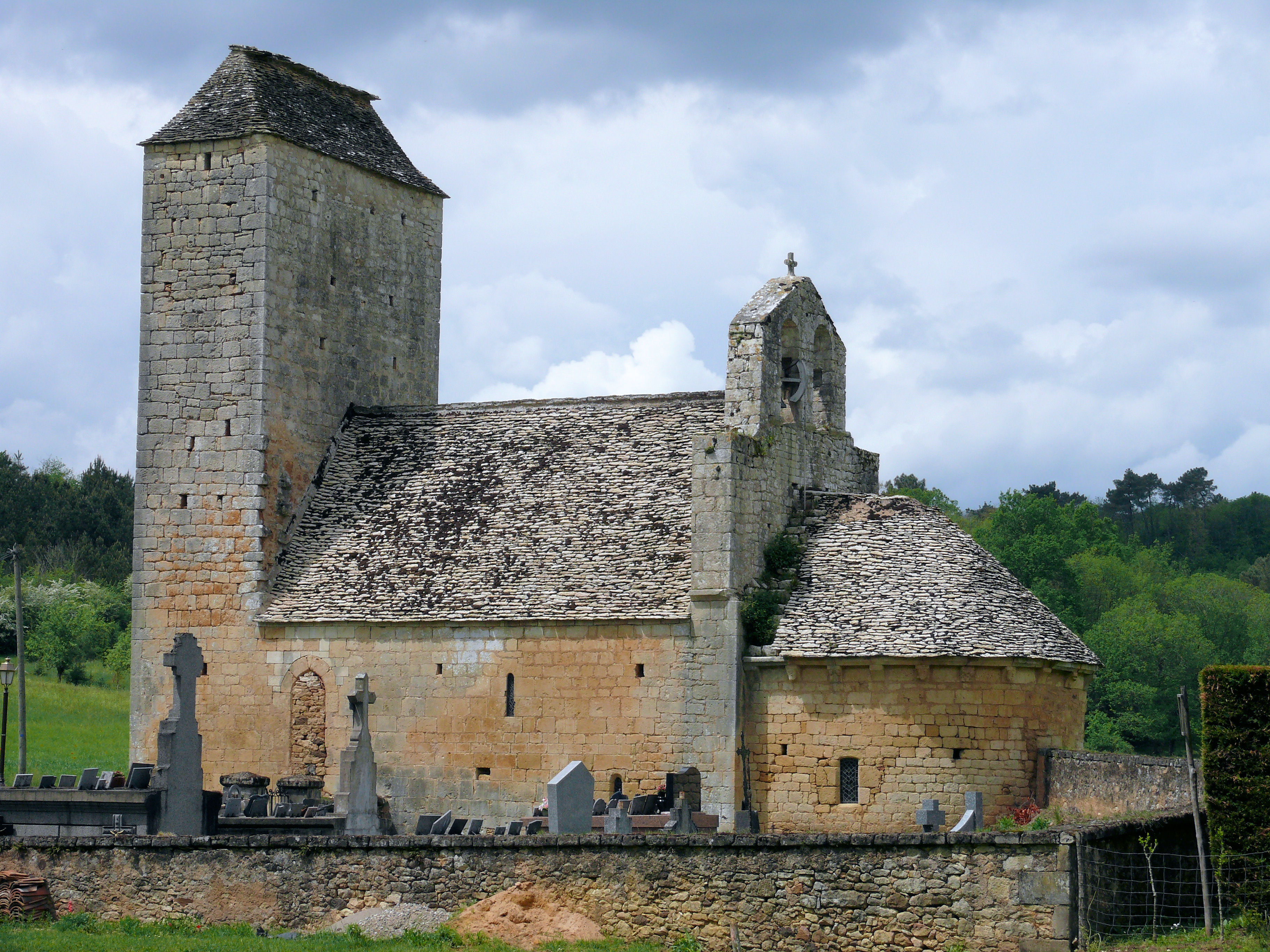 Mazeyrolles - Aigueparse - Eglise Notre-Dame-de-la-Nativité